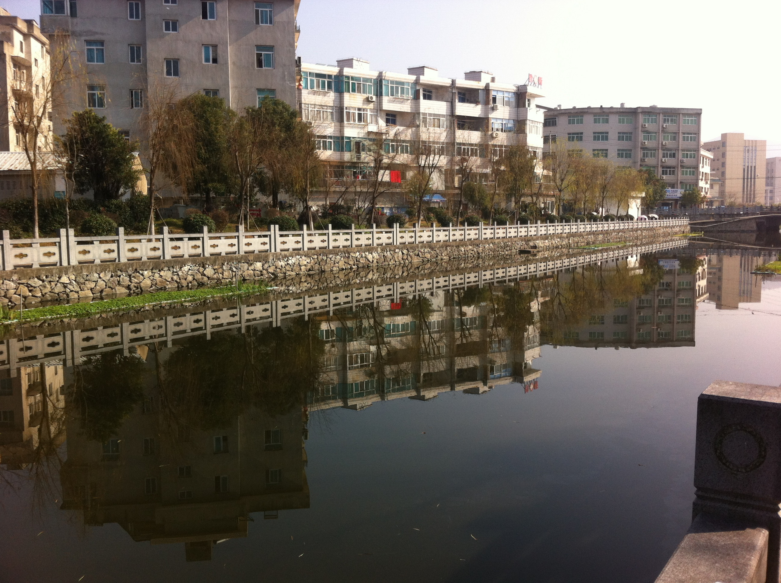 中文（中国大陆）: 浙江省玉环市大麦屿街道的庆澜河河畔